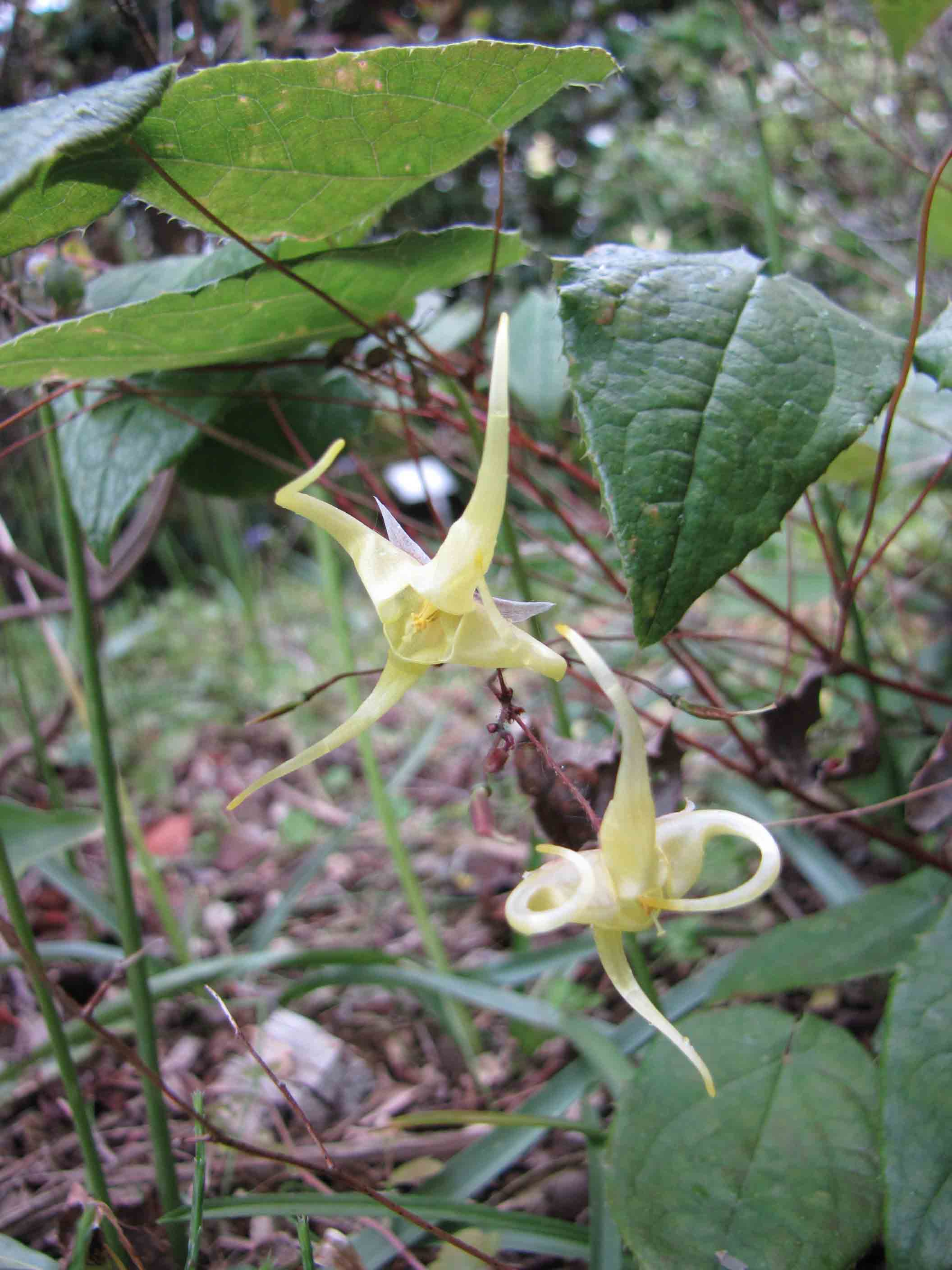 宝興淫羊藿 Epimedium membranaceum (Epimedium davidii) [比利時 Ghent University Botanical Garden, Belgium]